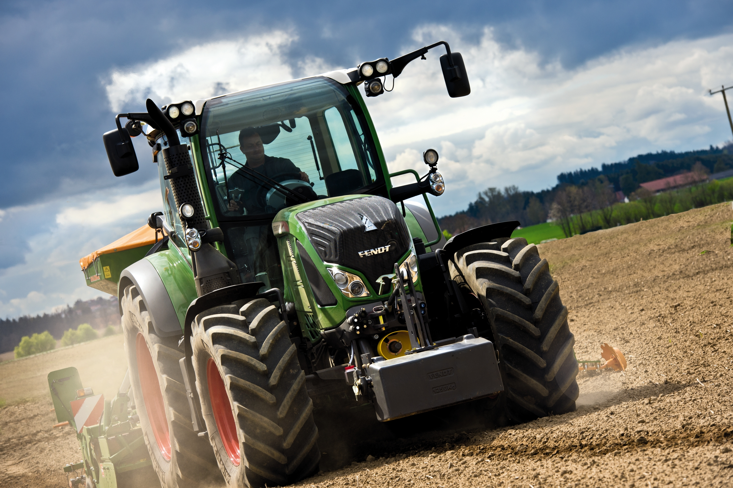 Fendt 500 Vario